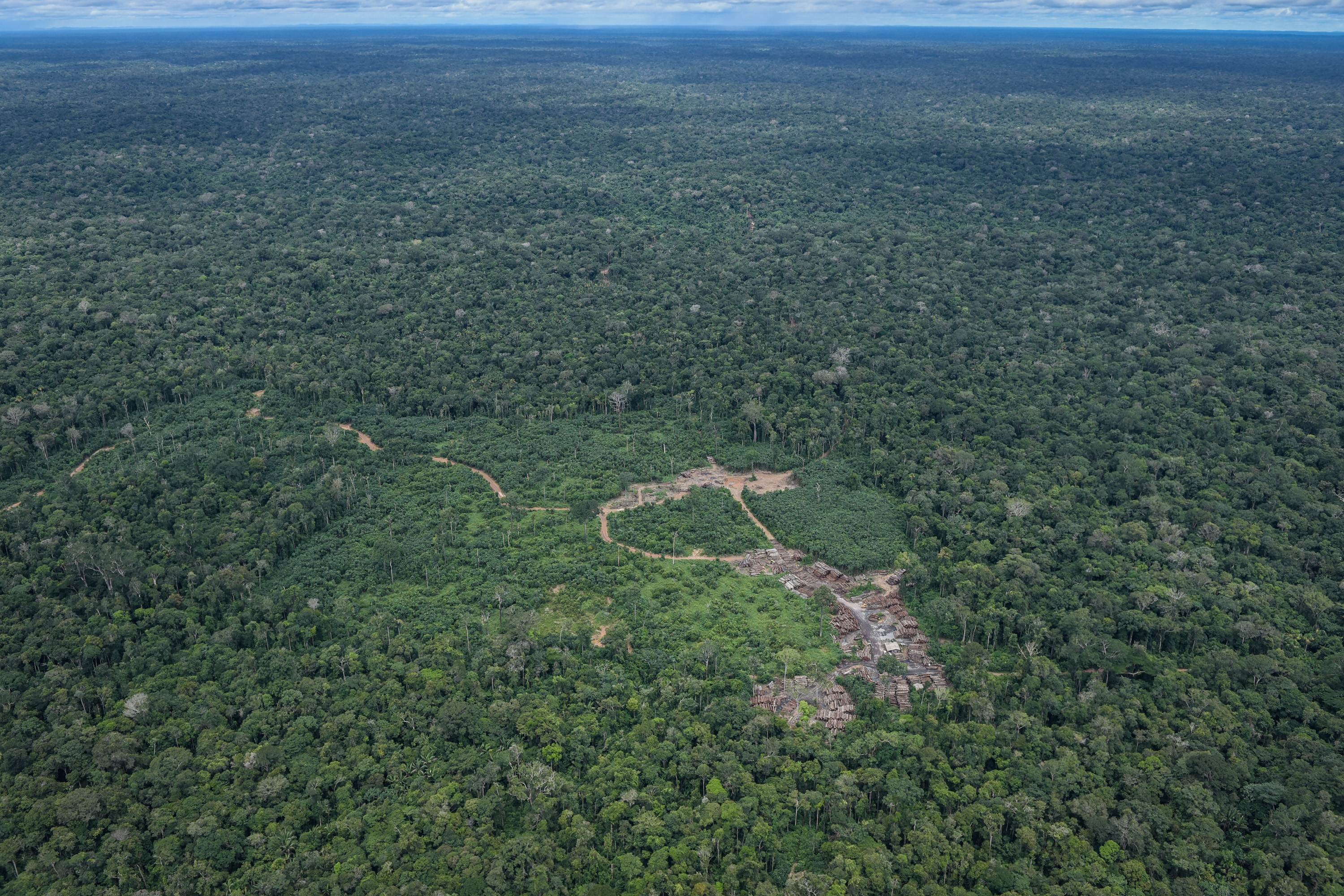 Ibama combate desmatamento ilegal na Terra Indígena Pirititi, Roraima Foto: Felipe Werneck/Ibama Mais informações